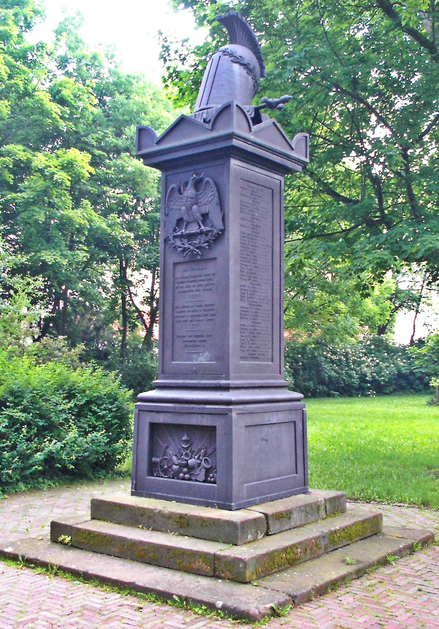 Napoleons-Veteranendenkmal, Peterspark Grünstadt, 1850. Gusseiserne Zweitfertigung nach dem Original von Aloys Boller auf dem alten Friedhof Worms.